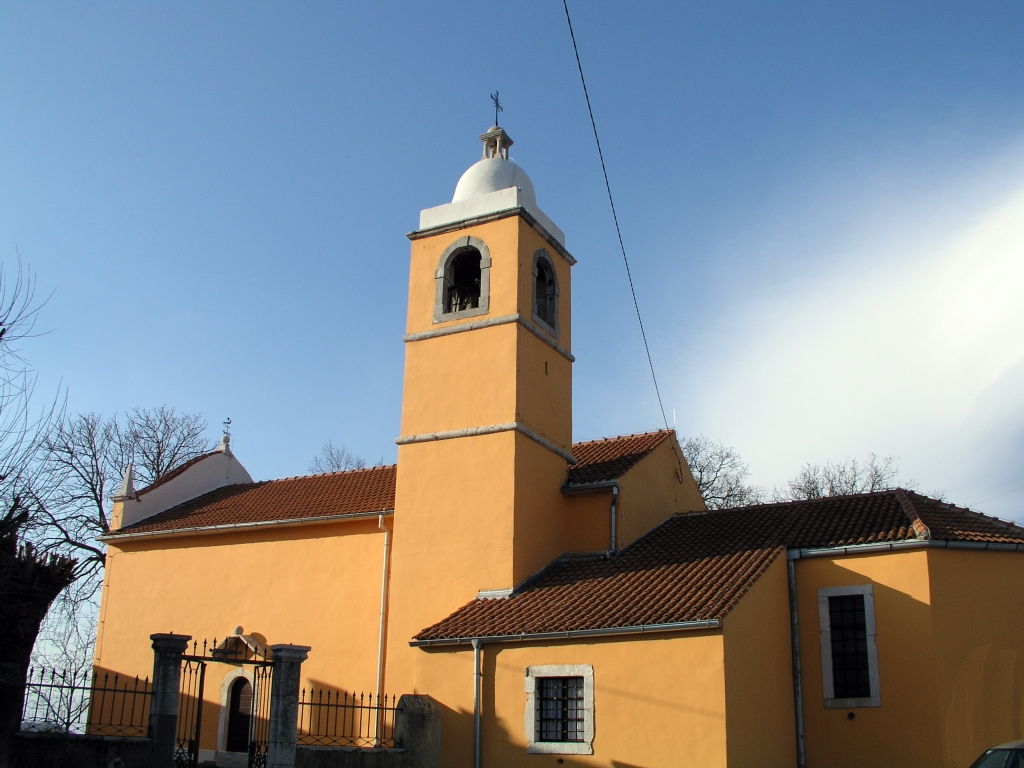 Crkva Svetog Kuzme i Damjana u Svetom Kuzmu, Hrvatska